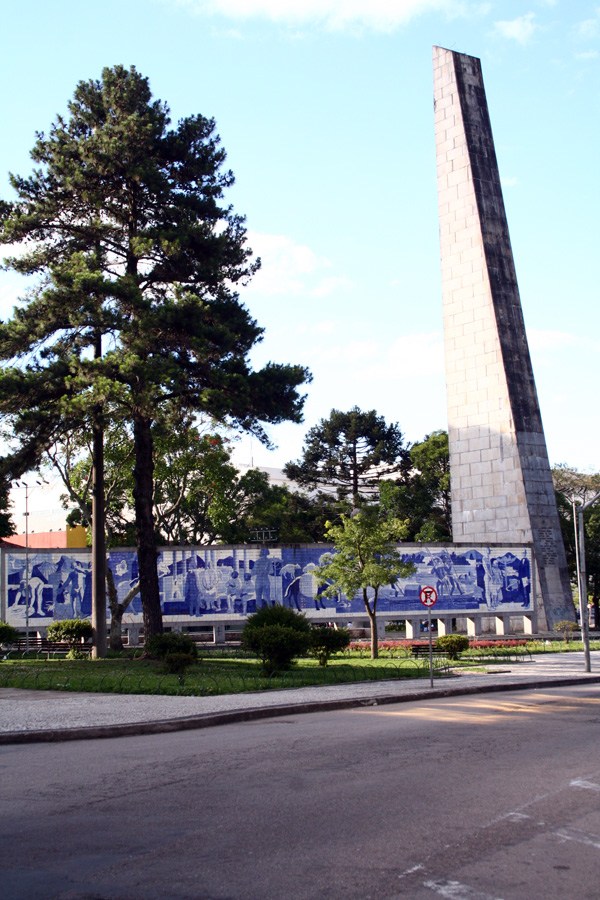 A Praça 19 de Dezembro é um logradouro de Curitiba, Paraná, Brasil. Seu nome rende homenagem à data de emancipação política do estado do Paraná, em 1853. (The December the 19th Square is a square in Curitiba, Brasil. The name refers to the official independence day of the province of Paraná, in 1853)